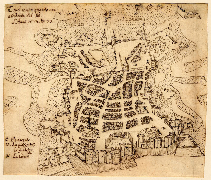 Ansicht von La Rochelle, 1573, Federzeichnung